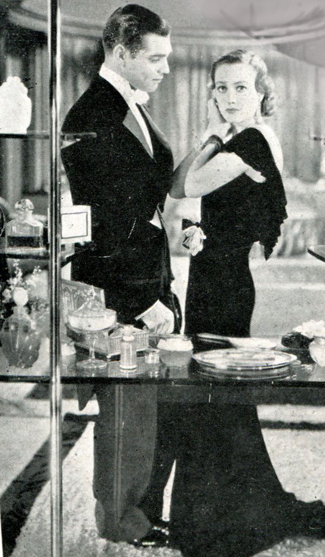 Clark Gable + Joan Crawford in "L'amante (Possessed), dir Clarence Brown, 1931